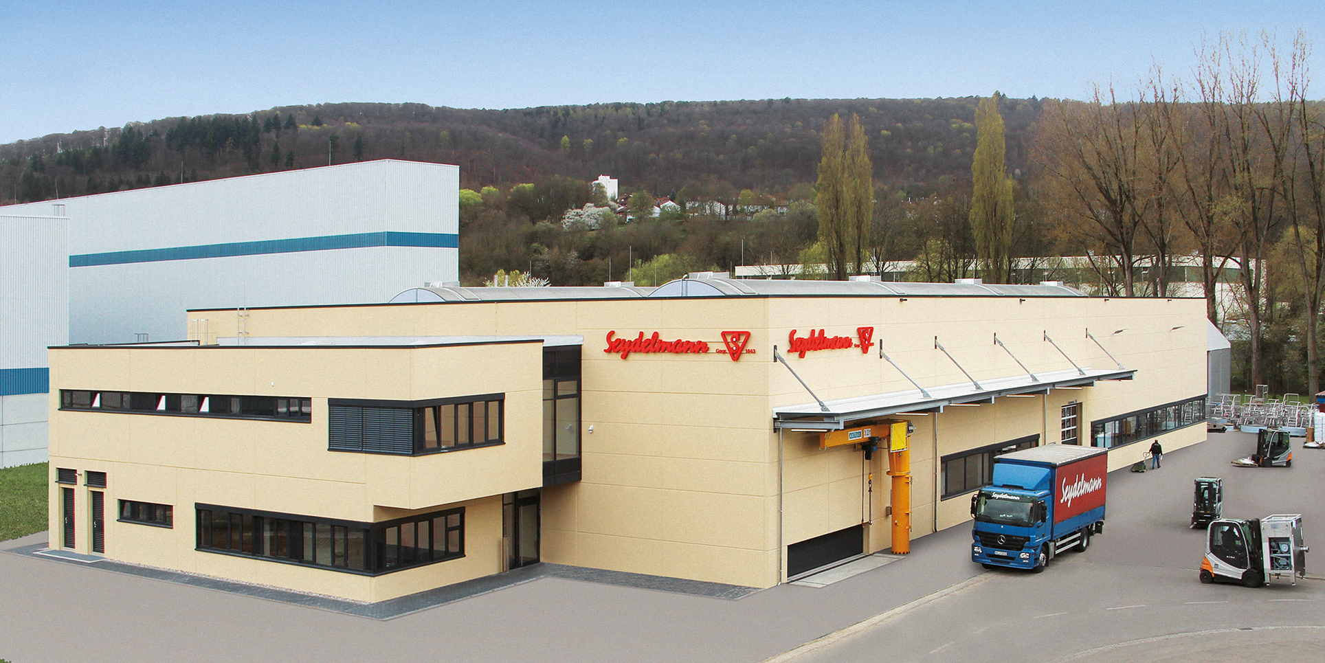 Seydelmann Neubau Zerspanung 2018